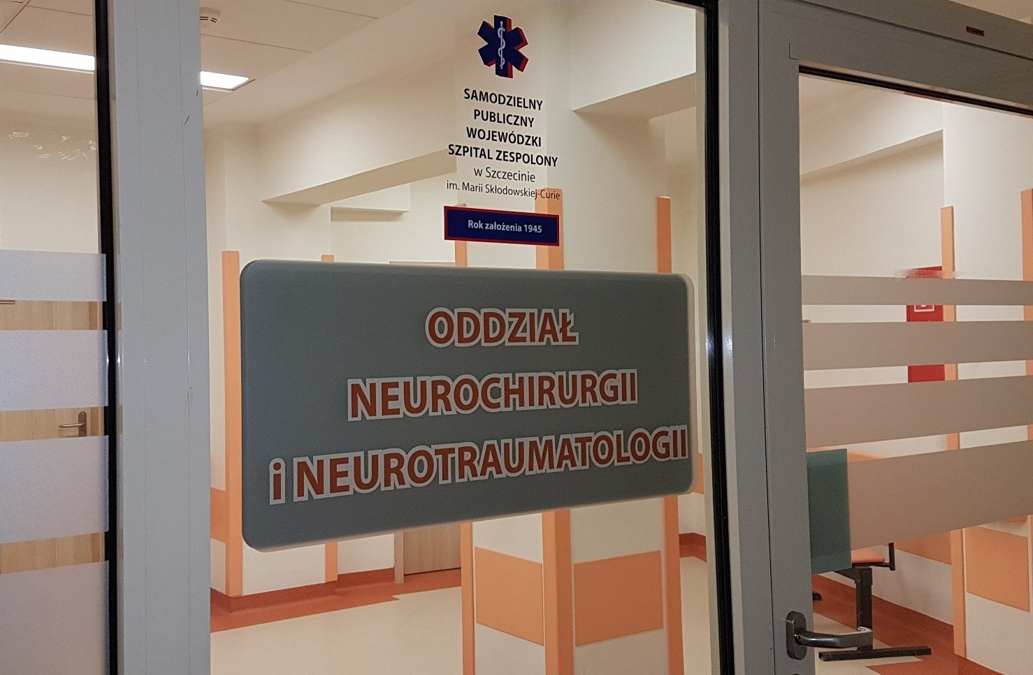 Oddział Neurochirurgii Szczecin